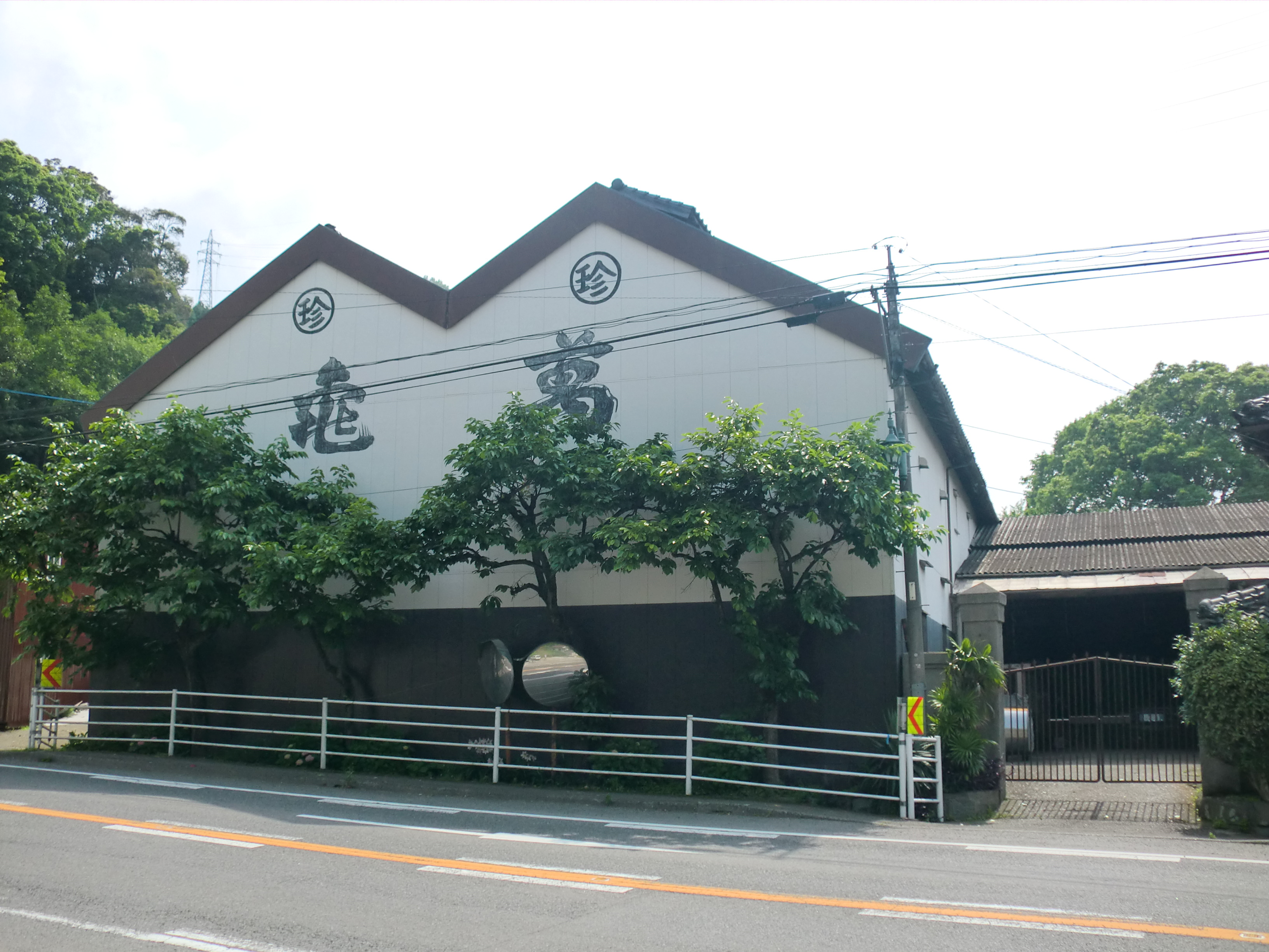 熊本県葦北郡津奈木町にある亀萬（かめまん）酒造